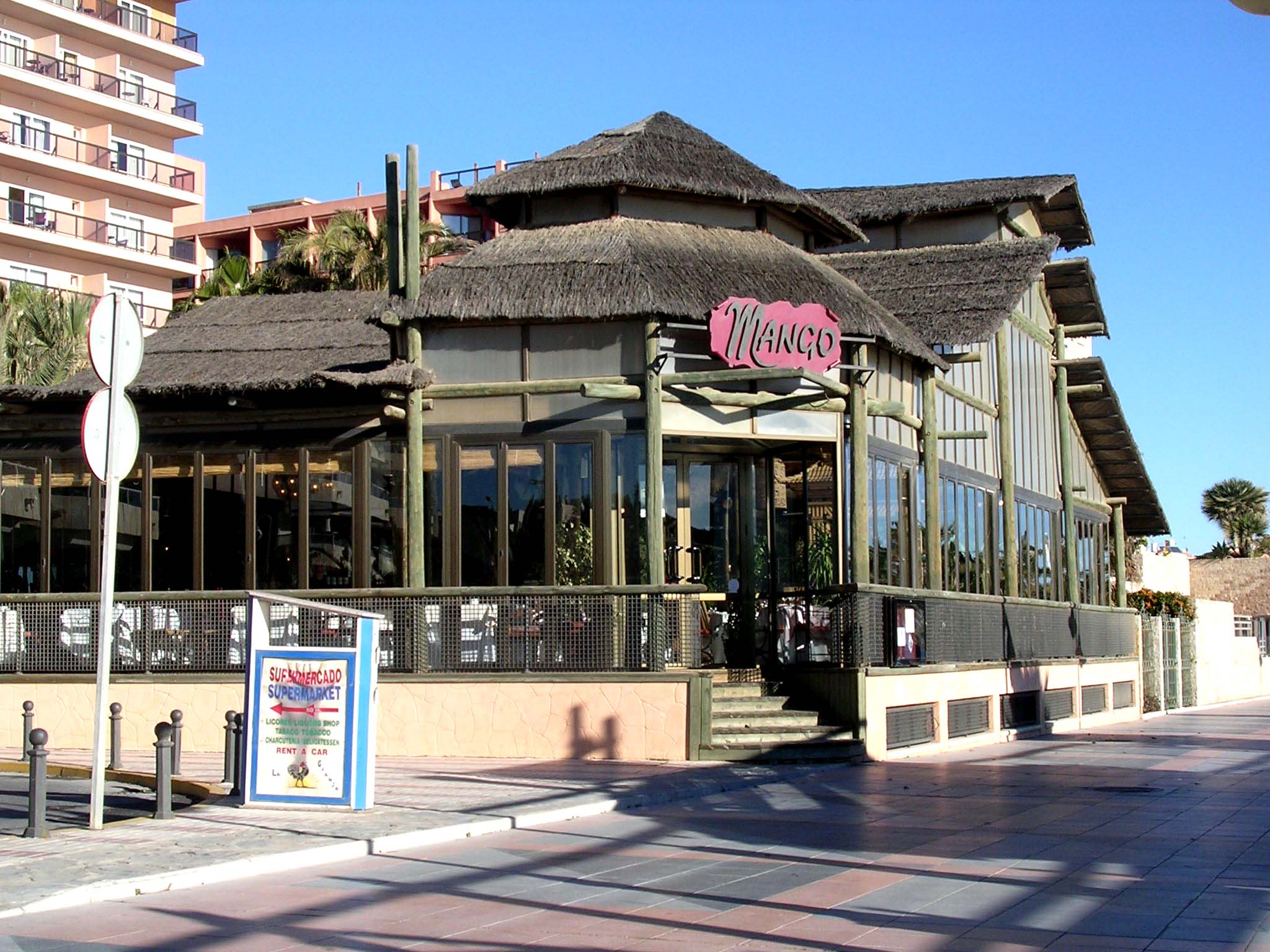 Sea front restaurant not far from Benalmadena Marina